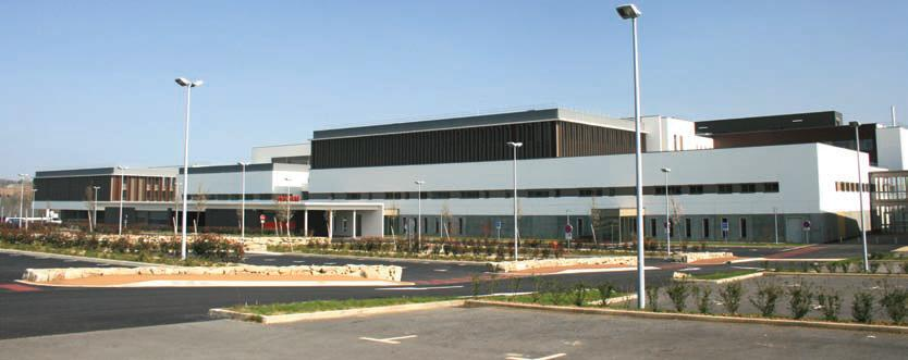 nouveau site hospitalier de Kério du Centre Hospitalier du Centre Bretagne